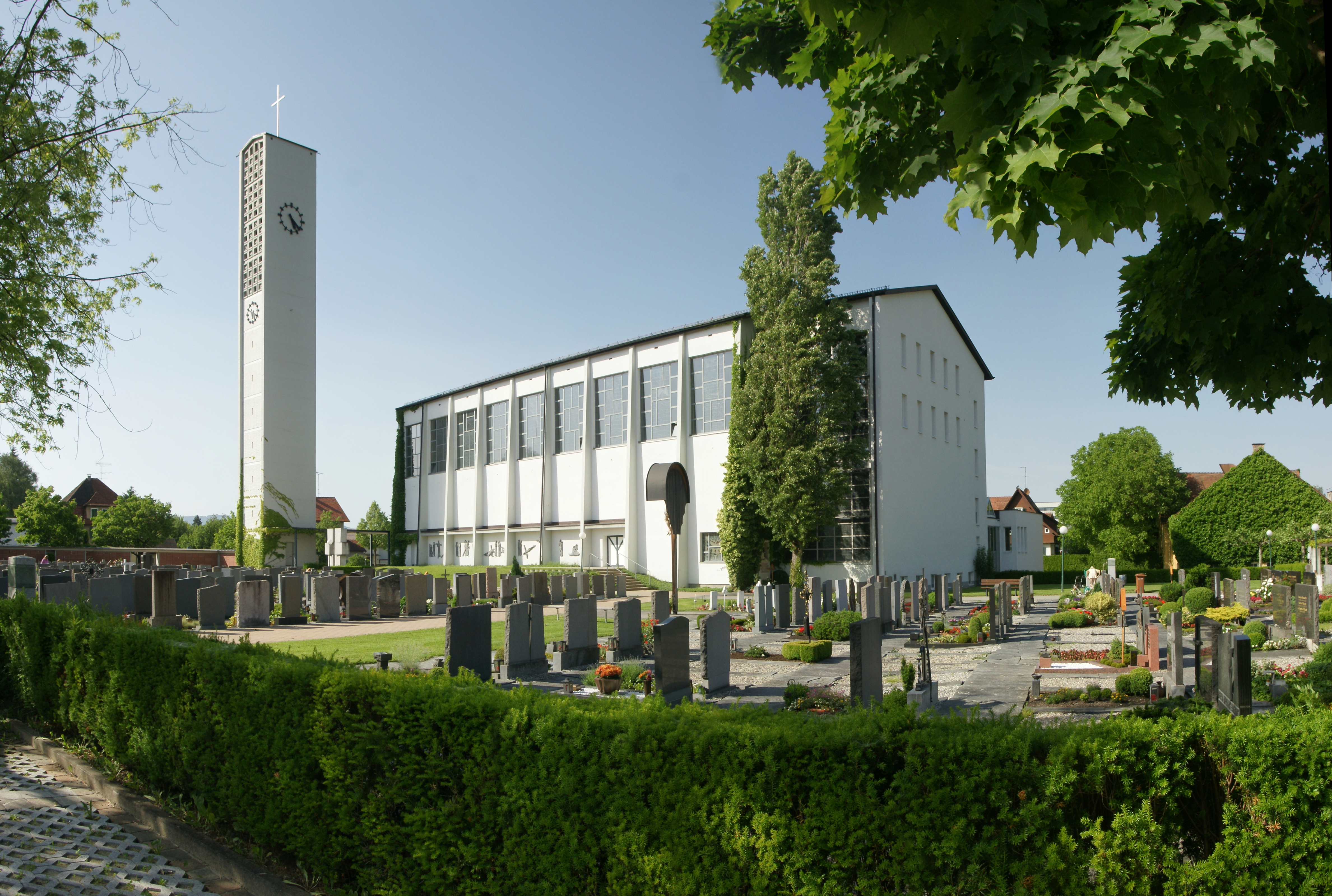 Pfarrkirche Hl. Nikolaus in Altach. Von 1956 bis 1960 erfolgte ein Neubau nach den Plänen des Architekten Norbert Kopf. Die Weihe war im Jahre 1962.